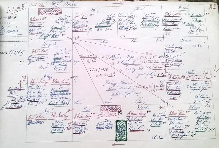 ĐMậu2